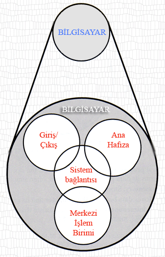 Bilgisayarın Genel Görünümü